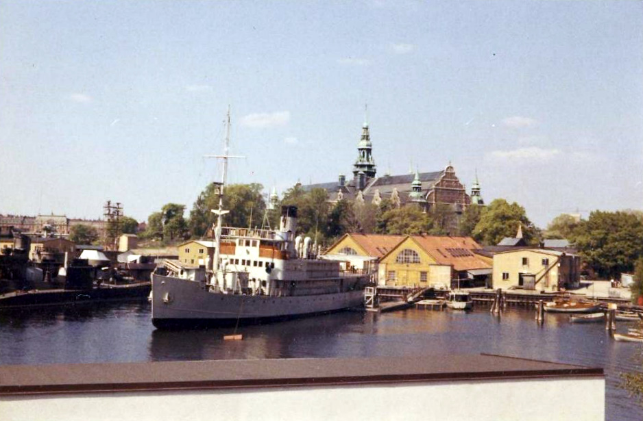 Galärvarvet and Nordiska museet Stockholm.